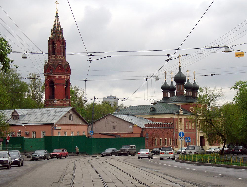 Московский Никольский единоверческий монастырь